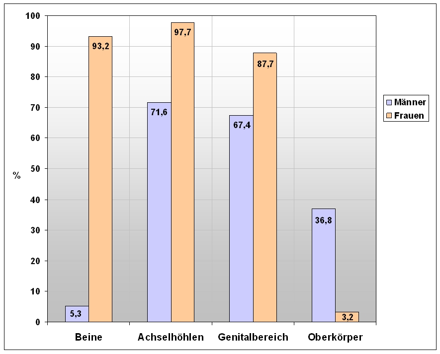 Die am häufigsten enthaarten Körperregionen. Basierend auf einer Erhebung von Studenten. Durchschnittsalter: 23 Jahre, Ort: Leipzig (Deutschland), Datum:2008